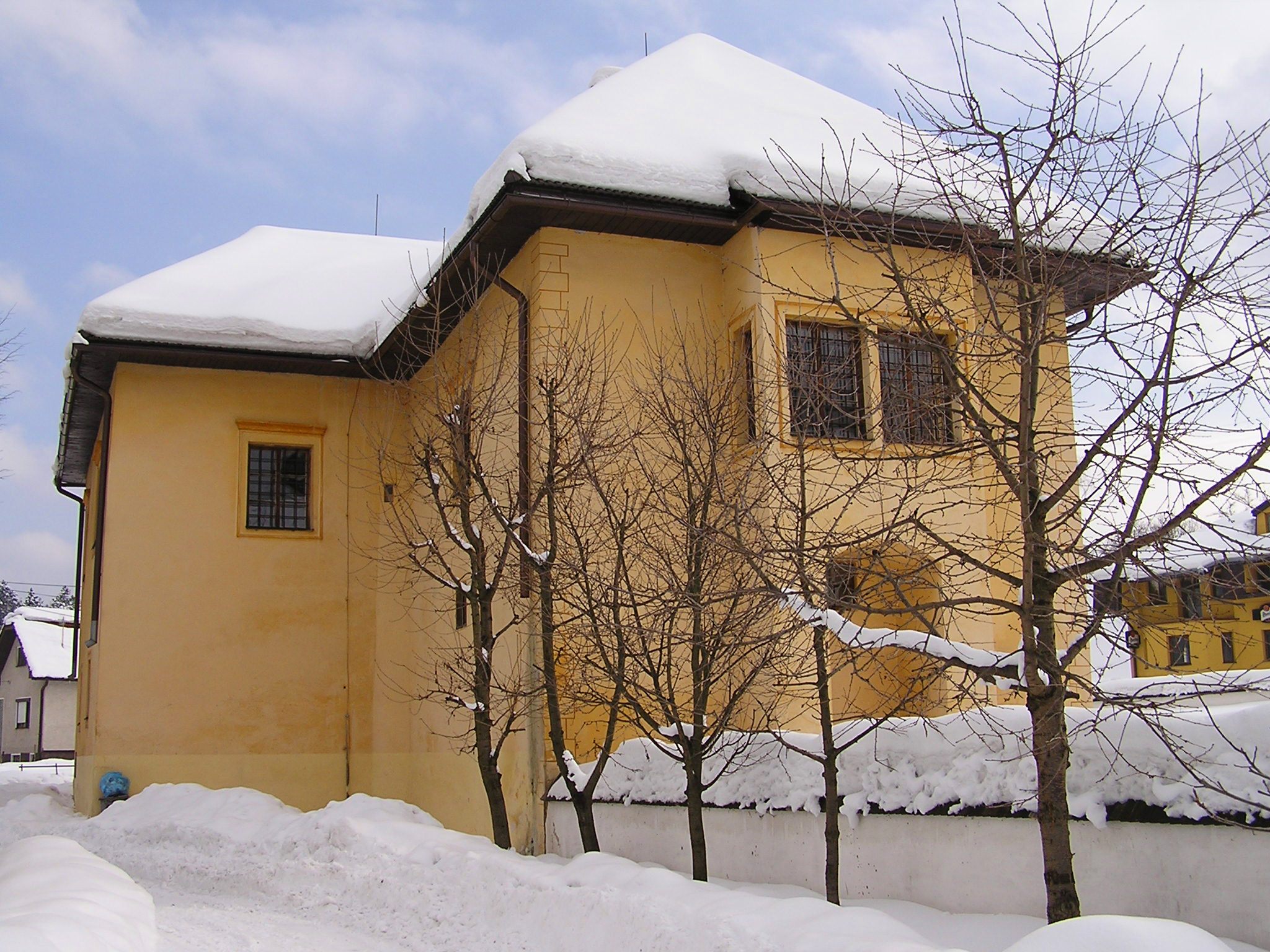 Kaštieľ v Radoli, zimný pohľad na areál.